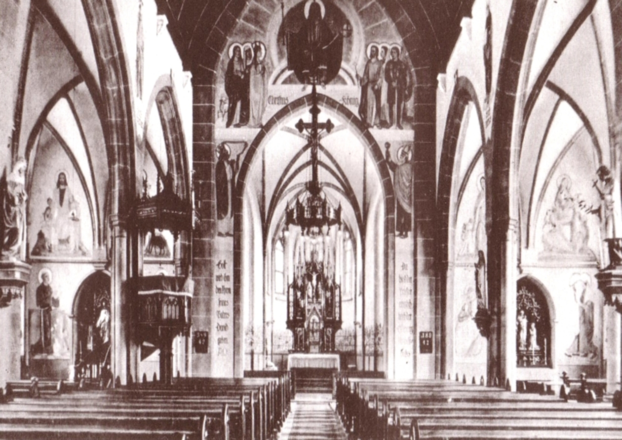 Katholische Pfarrkirche St. Michael (Aschaffenburg-Damm) ausgemalt 1927 von Alois Bergmann-Franken